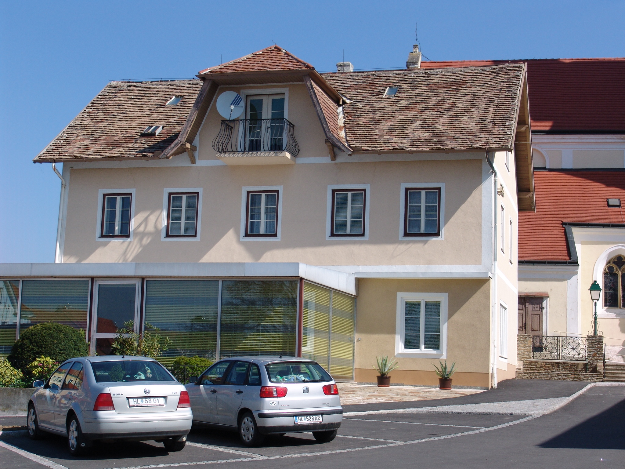 Sitzendorf Hauptplatz 2